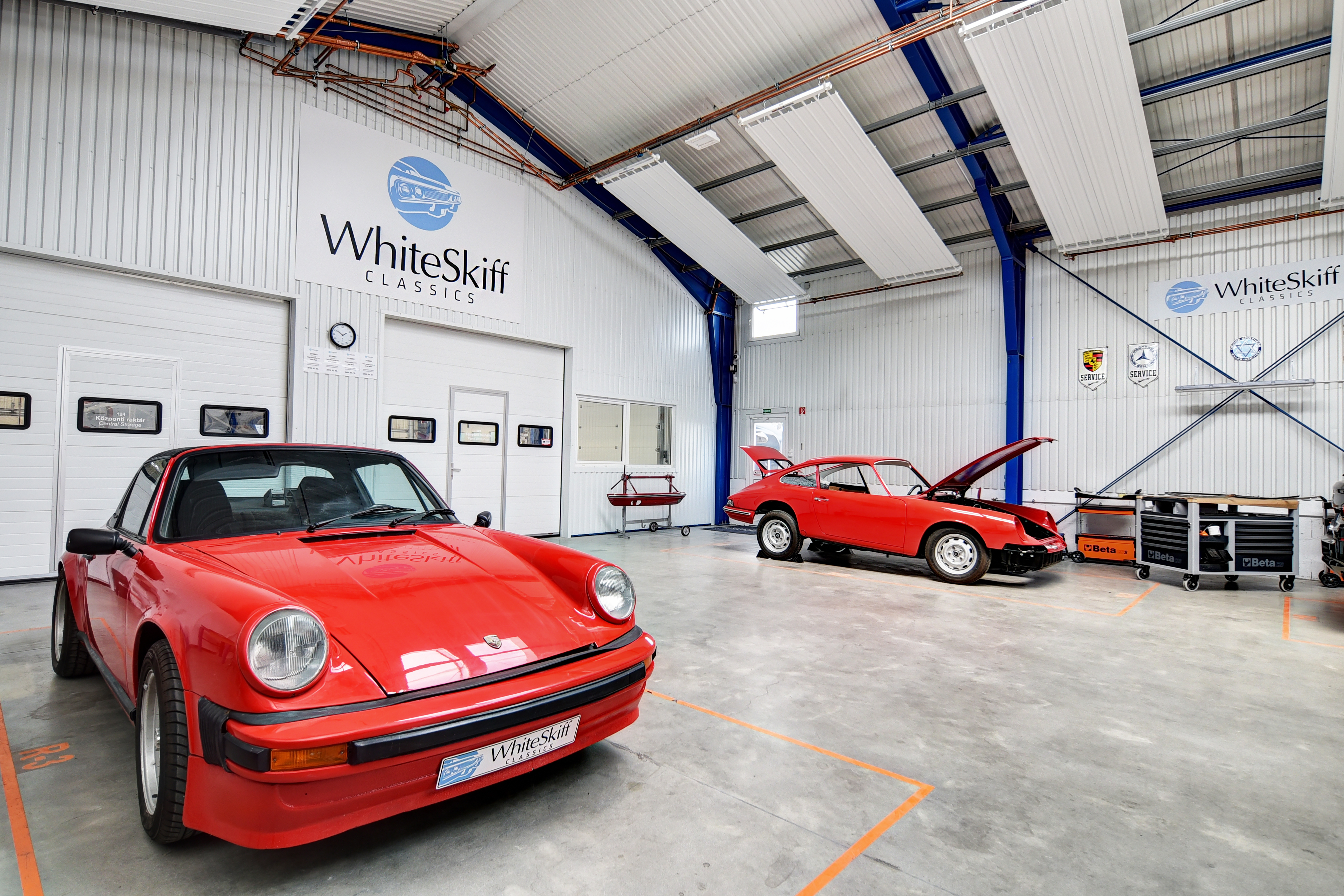 WSC restaurátor műhely